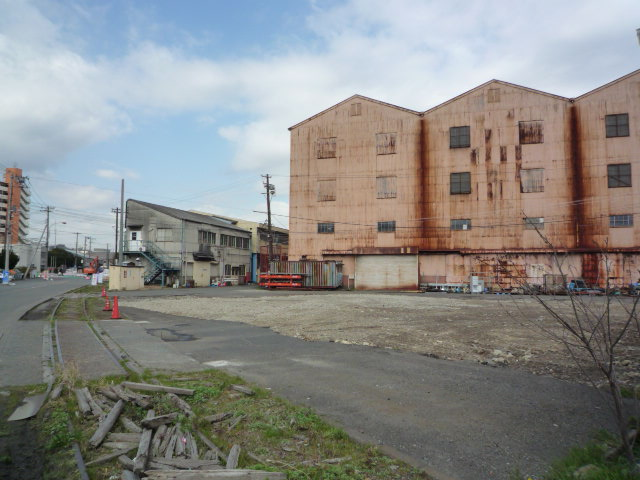 田浦(長浦倉庫群）の画像